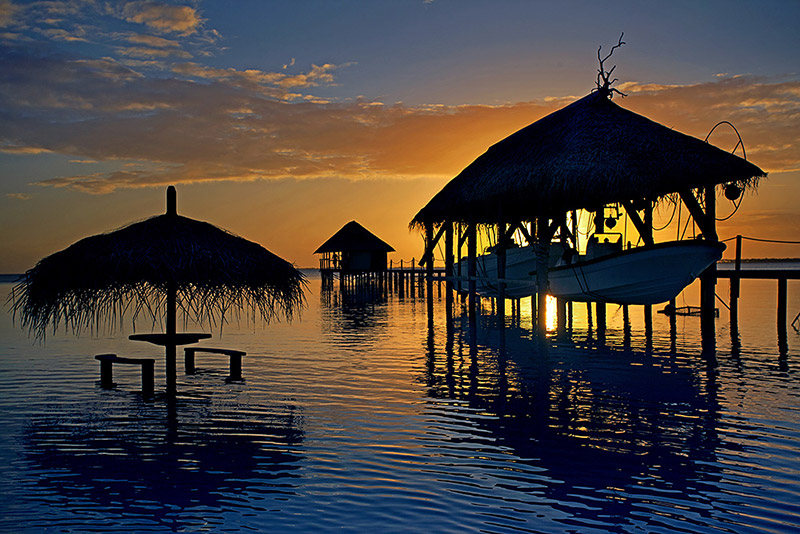 Fakarava - Sonnenuntergang